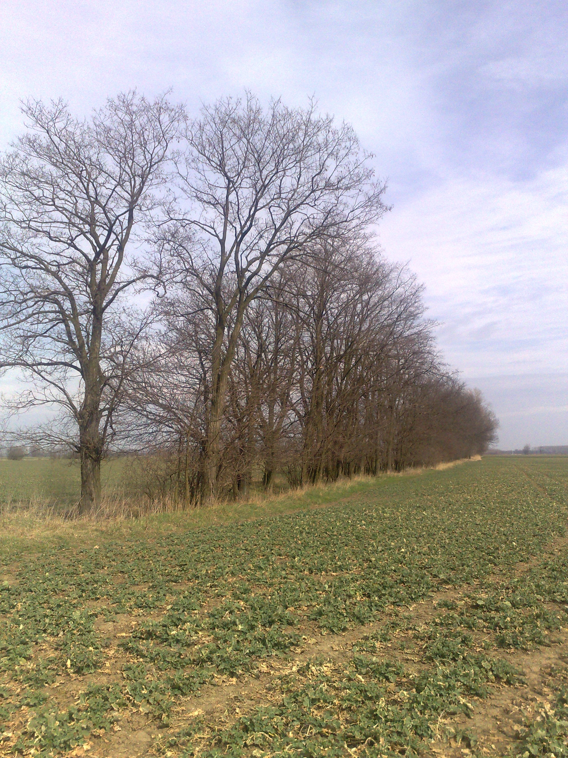 A Buga-csatorna indulása (Szany, Keleti-felső-mező)